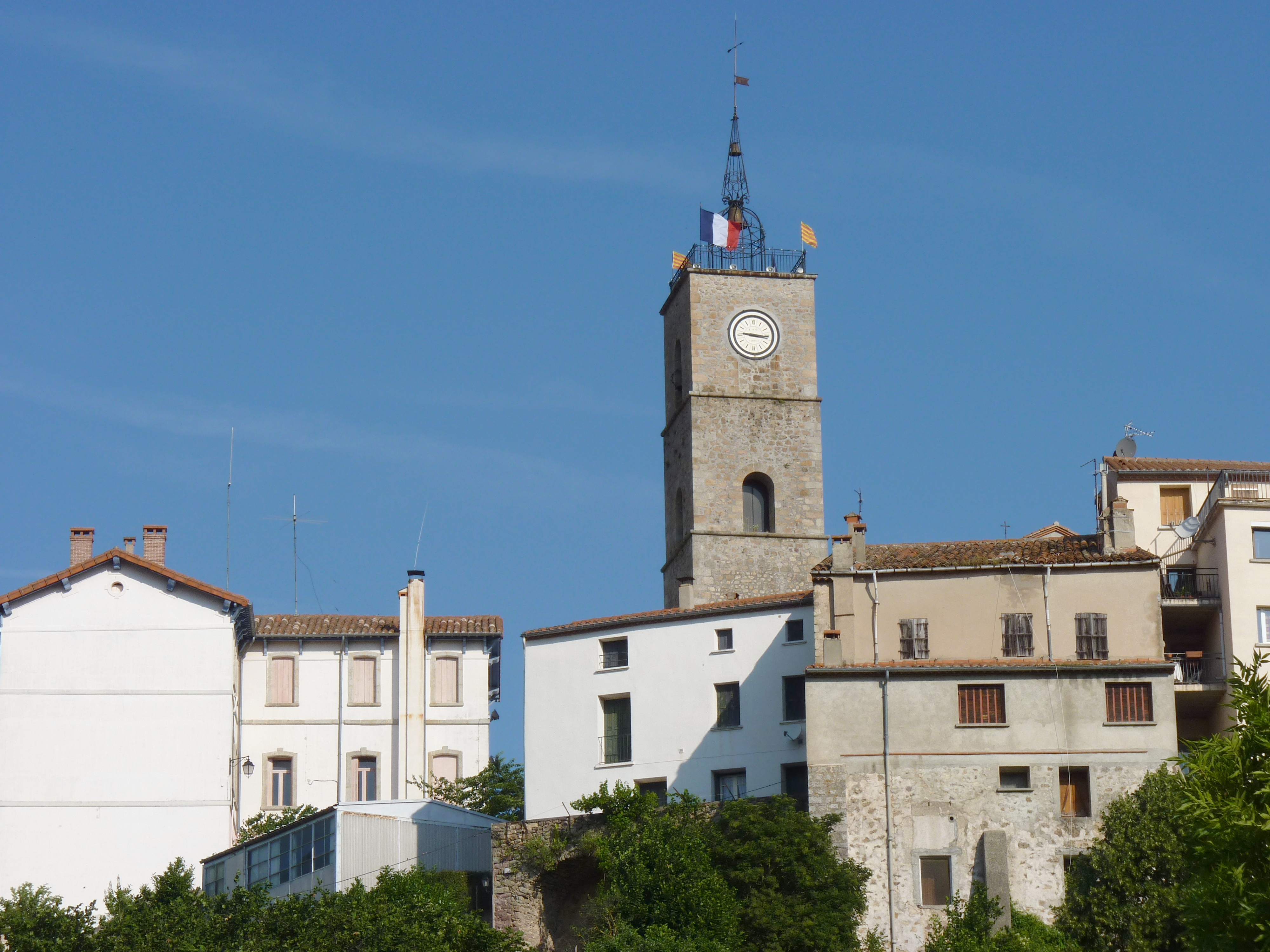 Église de Saint-Laurent-de-Cerdans (Pyrénées-Orientales, Languedoc-Roussillon, France)